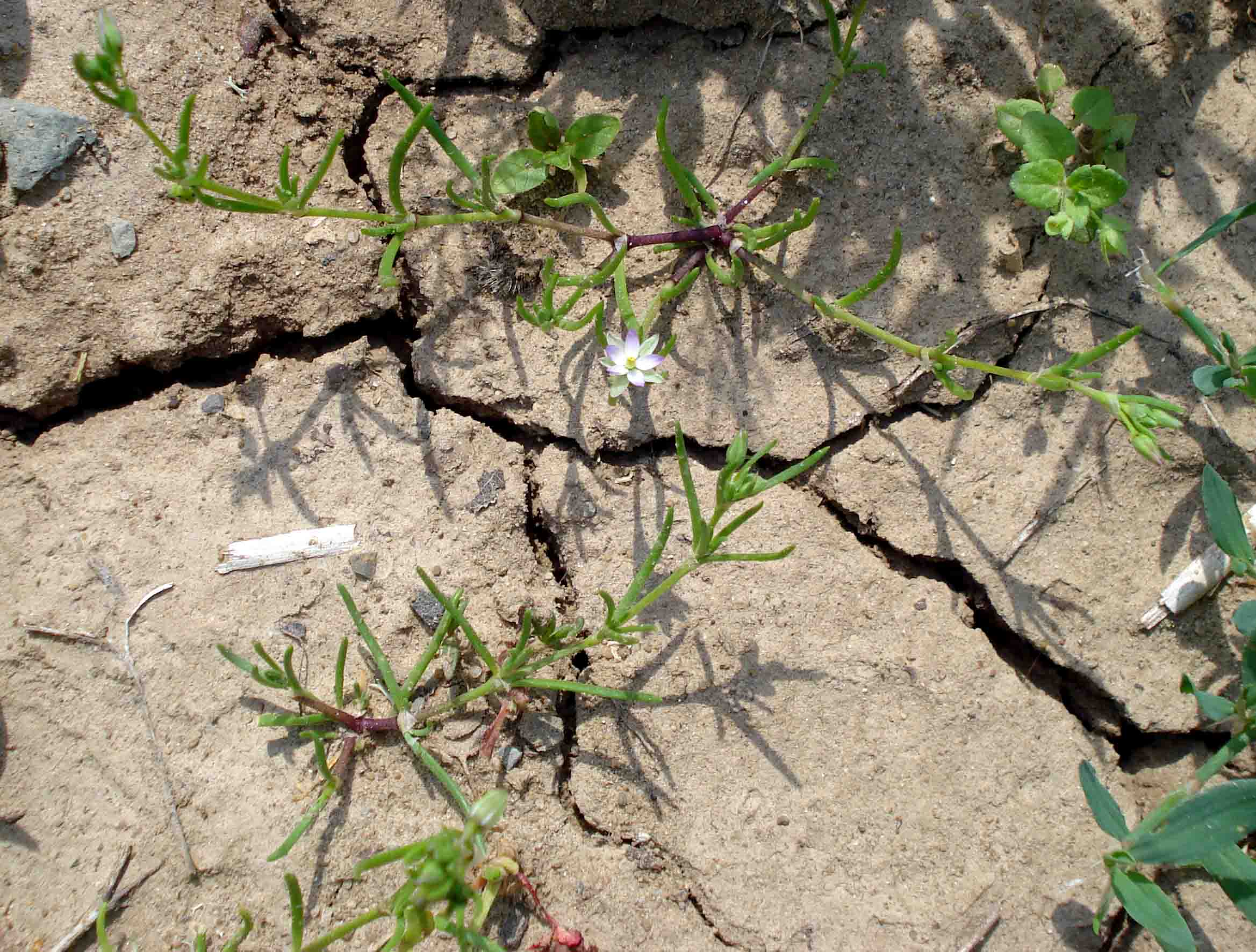 Spergularia salina (Unterfranken, Germany)